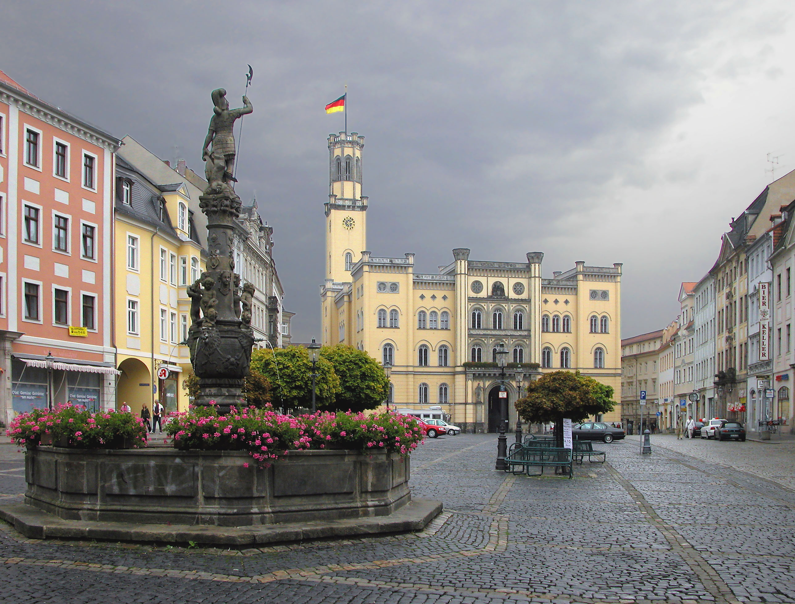 03.10.2003 02763 Zittau, Marktplatz: Vorn der Rolandbrunnen (auch Marsbrunnen, GMP: 50.896193,14.805817). Hinten das Rathaus (GMP: 50.896093,14.807503), 1840-45 nach Plänen von Karl Friedrich Schinkel unter Leitung von Carl August Schramm in Anlehnung an mittelalterliche, italienische Stadtpaläste errichtet. [-]20031003200DR.LPG(c)Blobelt